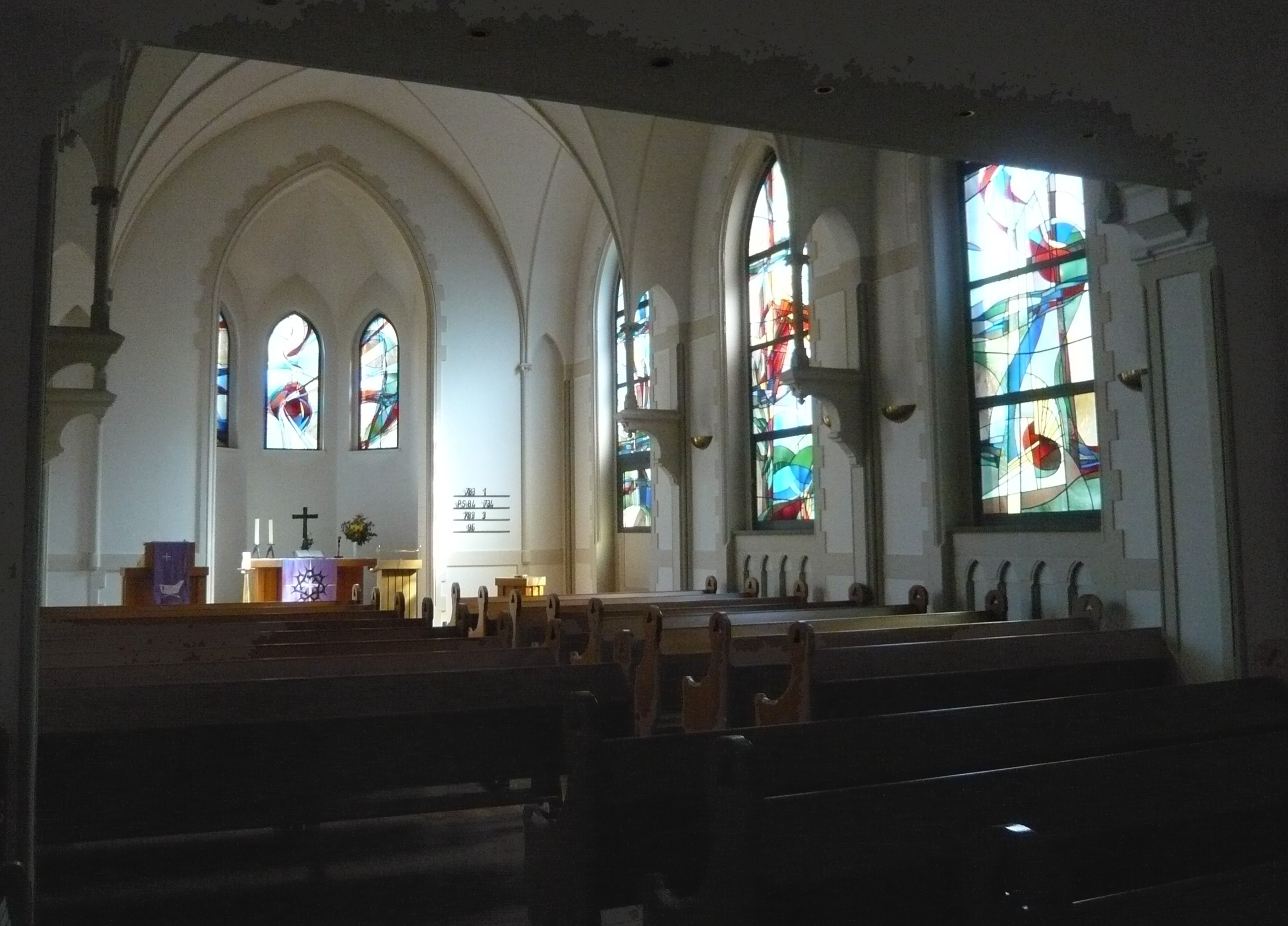 Paul-Gerhardt-Stift Berlin